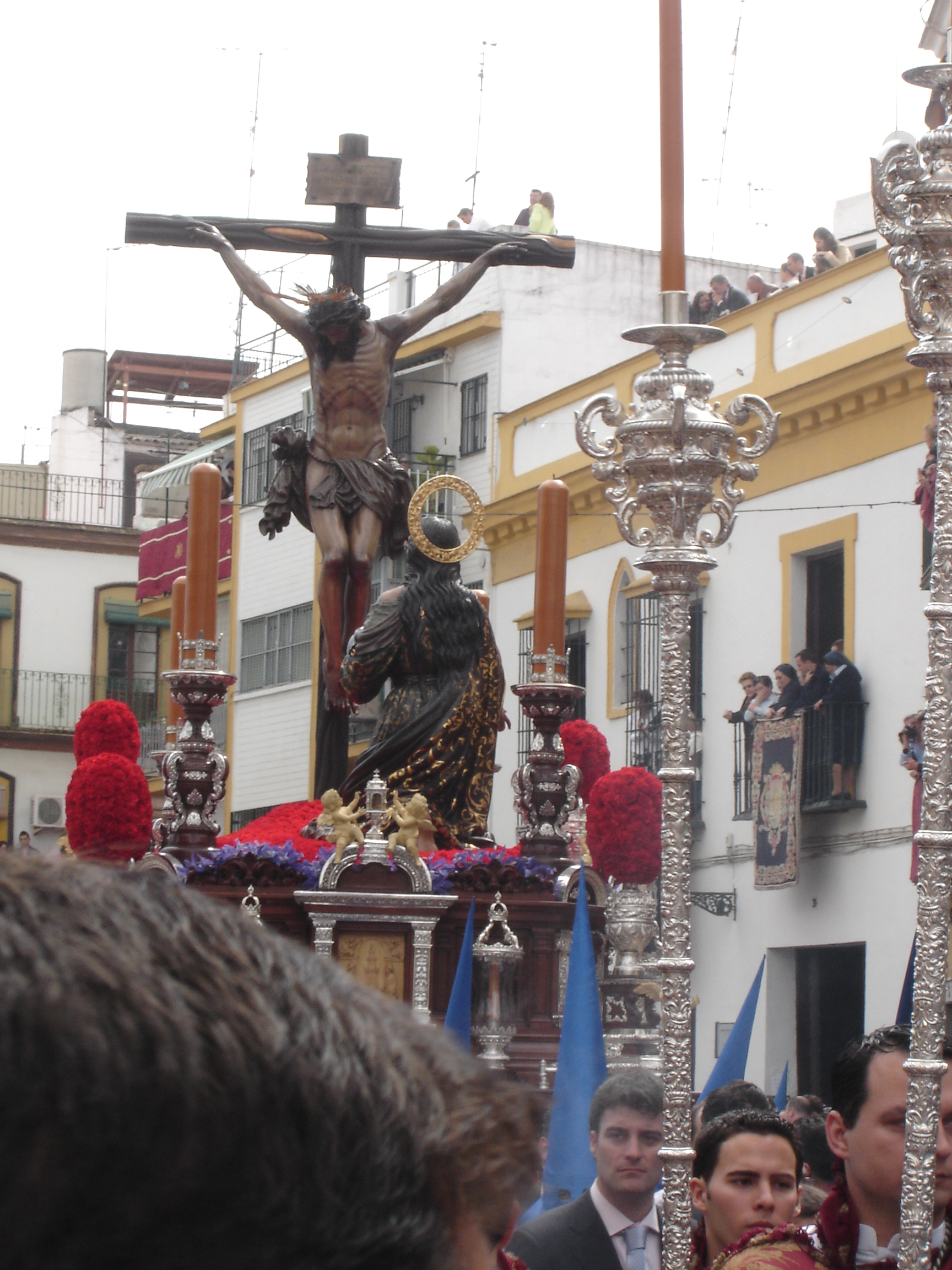 Santísimo Cristo de la Buena Muerte. Semana Santa en Sevilla. Año 2007 Realización propia